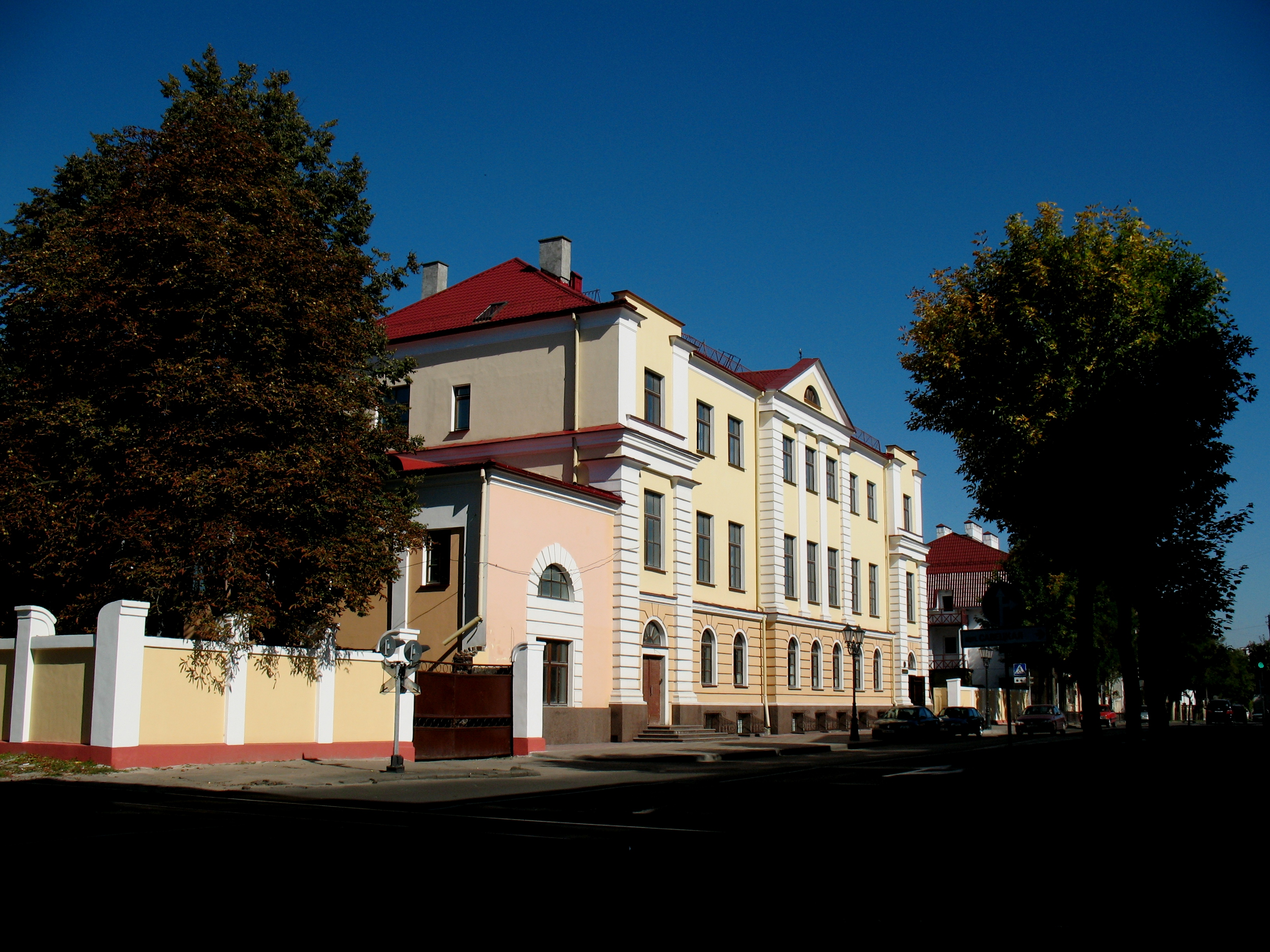 Беларуская (тарашкевіца): Будынак Берасьцейскай абласной філярмоніі. г. Берасьце This is a photo of Belarusian heritage monument. Reference number: 113Г000003 ( WLM)